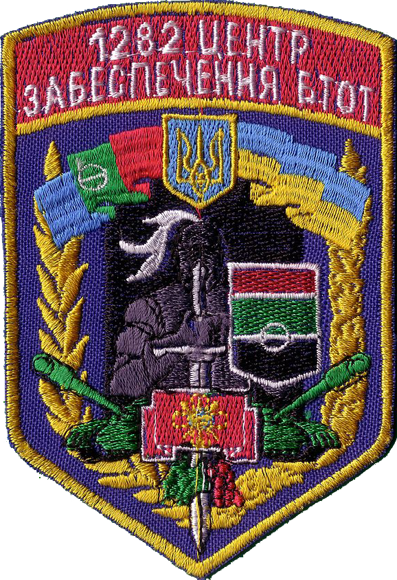 1282-й центр забезпечення бронетанкового озброєння та техніки, Бахмут